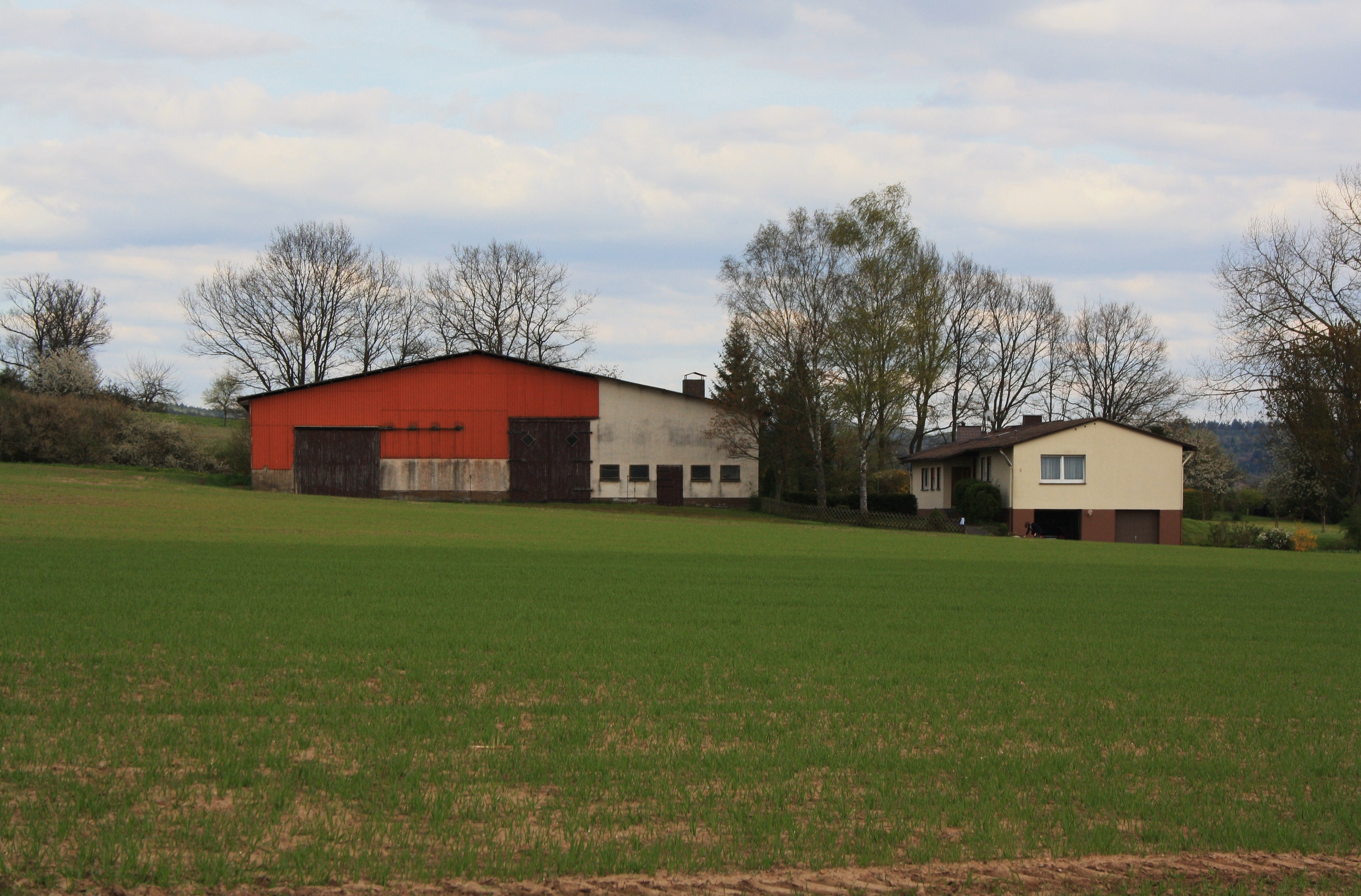 Typischer Aussiedlerhof Nahe dem Wartturm in Fulda-Lüdermünd